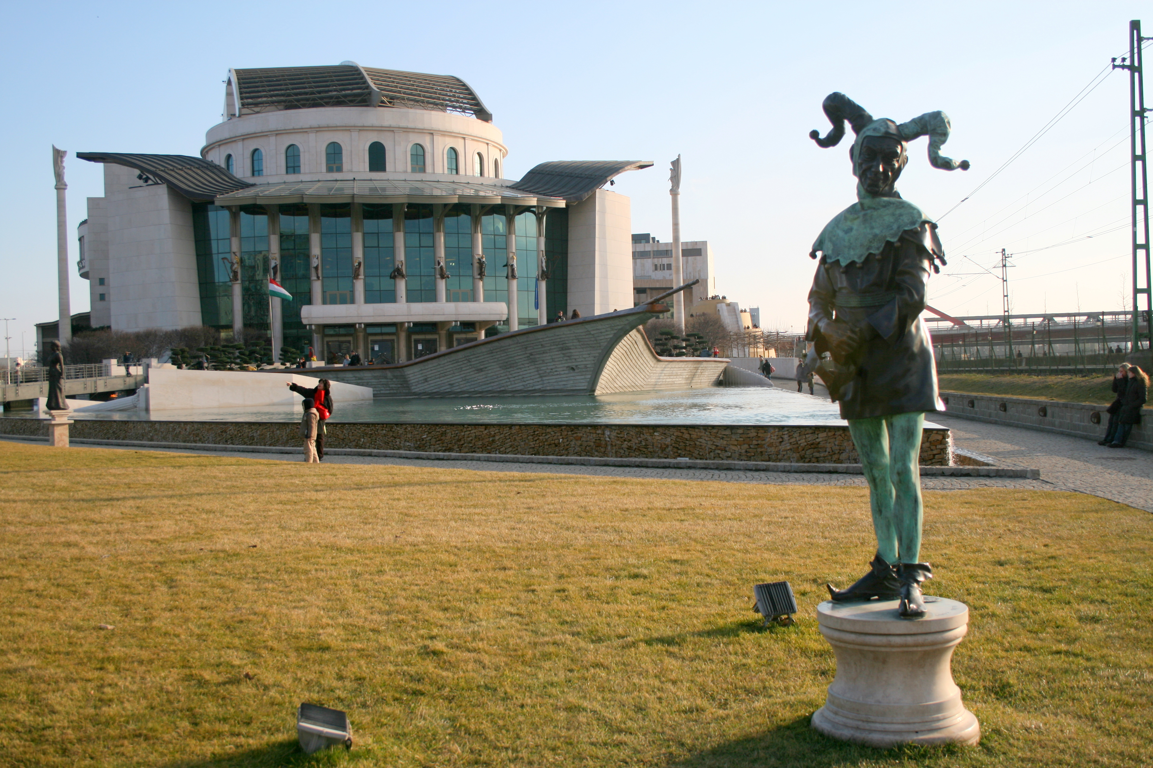 Budova Národního divadla v Budapešti, Maďarsko